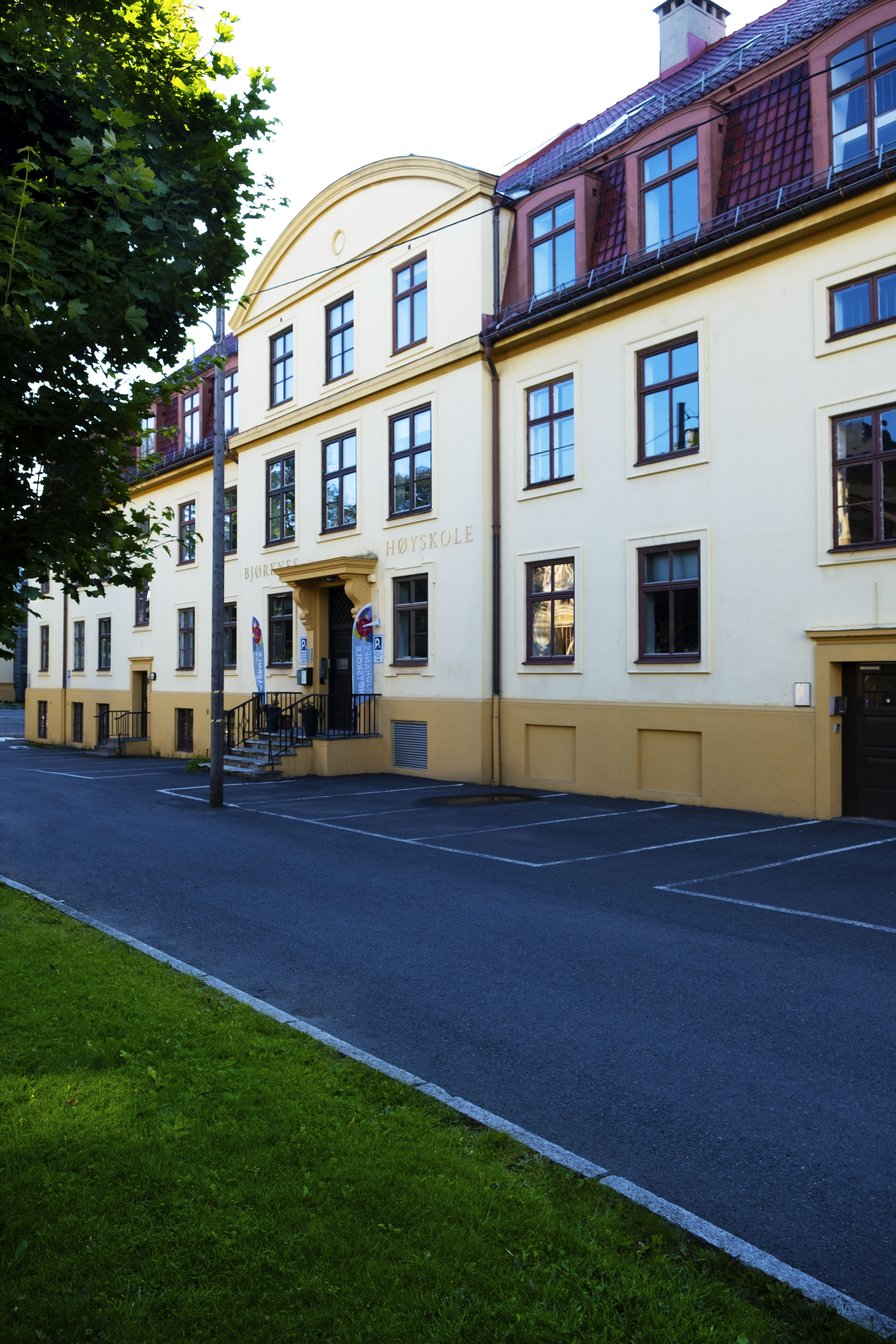 Bjørknes Høyskoles fasade